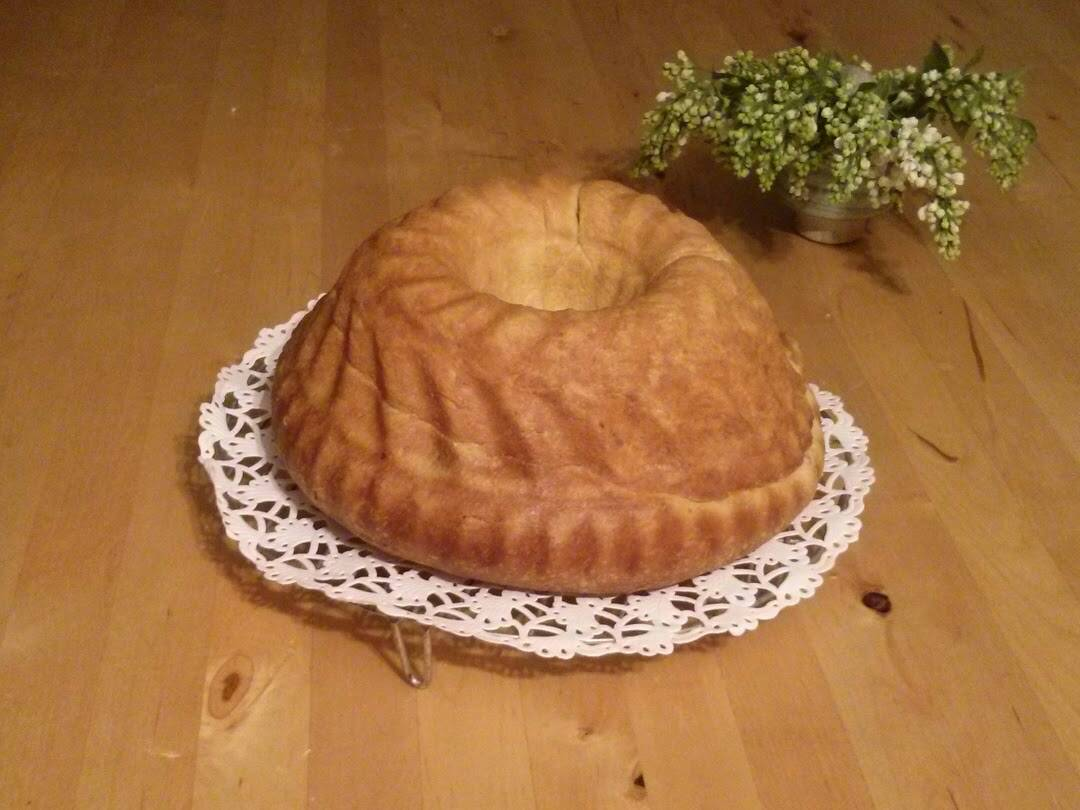 Stillleben eines Kärntner Reindlings